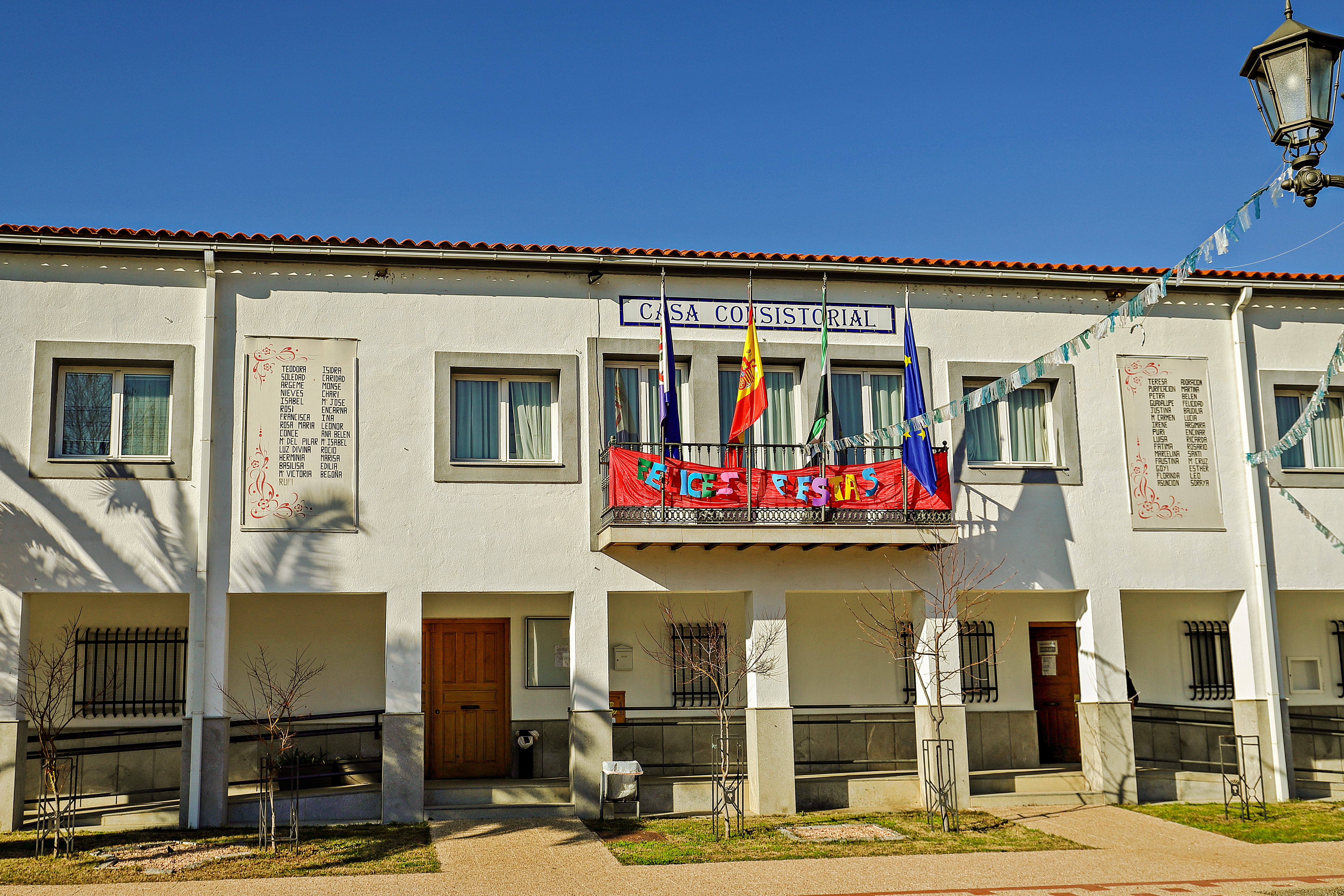 Alagón del Río municipio de la comarca de Vegas de Alagón, en la provincia de Cáceres